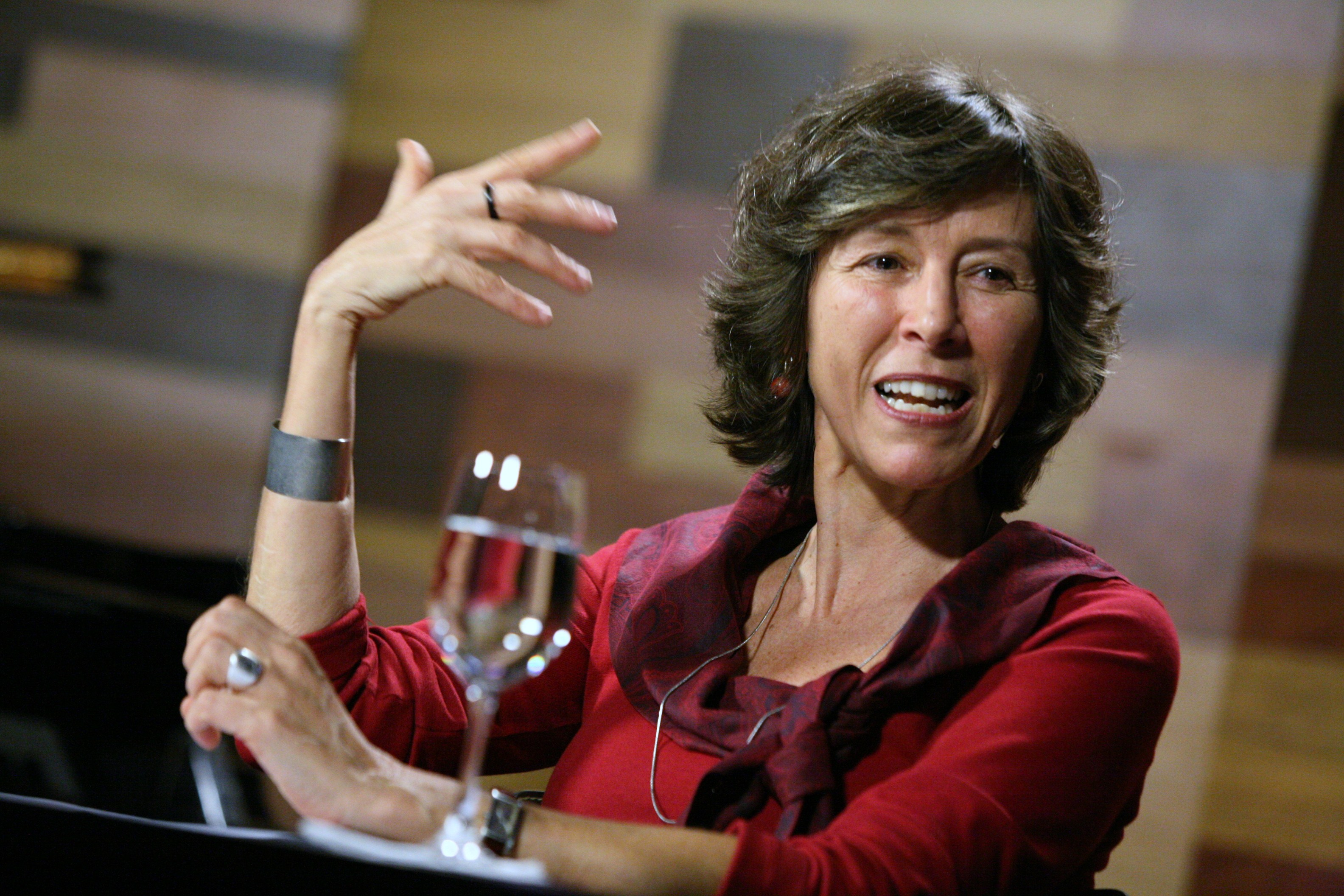 Café Filosófico com Maria Rita Kehl em São Paulo 24/06/09 Foto: Damião A. Francisco